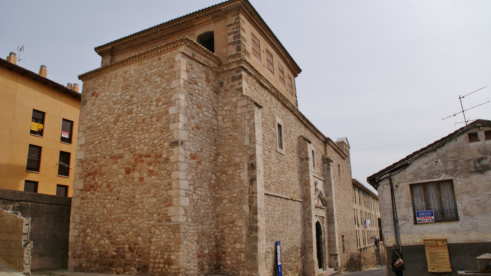 Brihuega, villa de Guadalajara